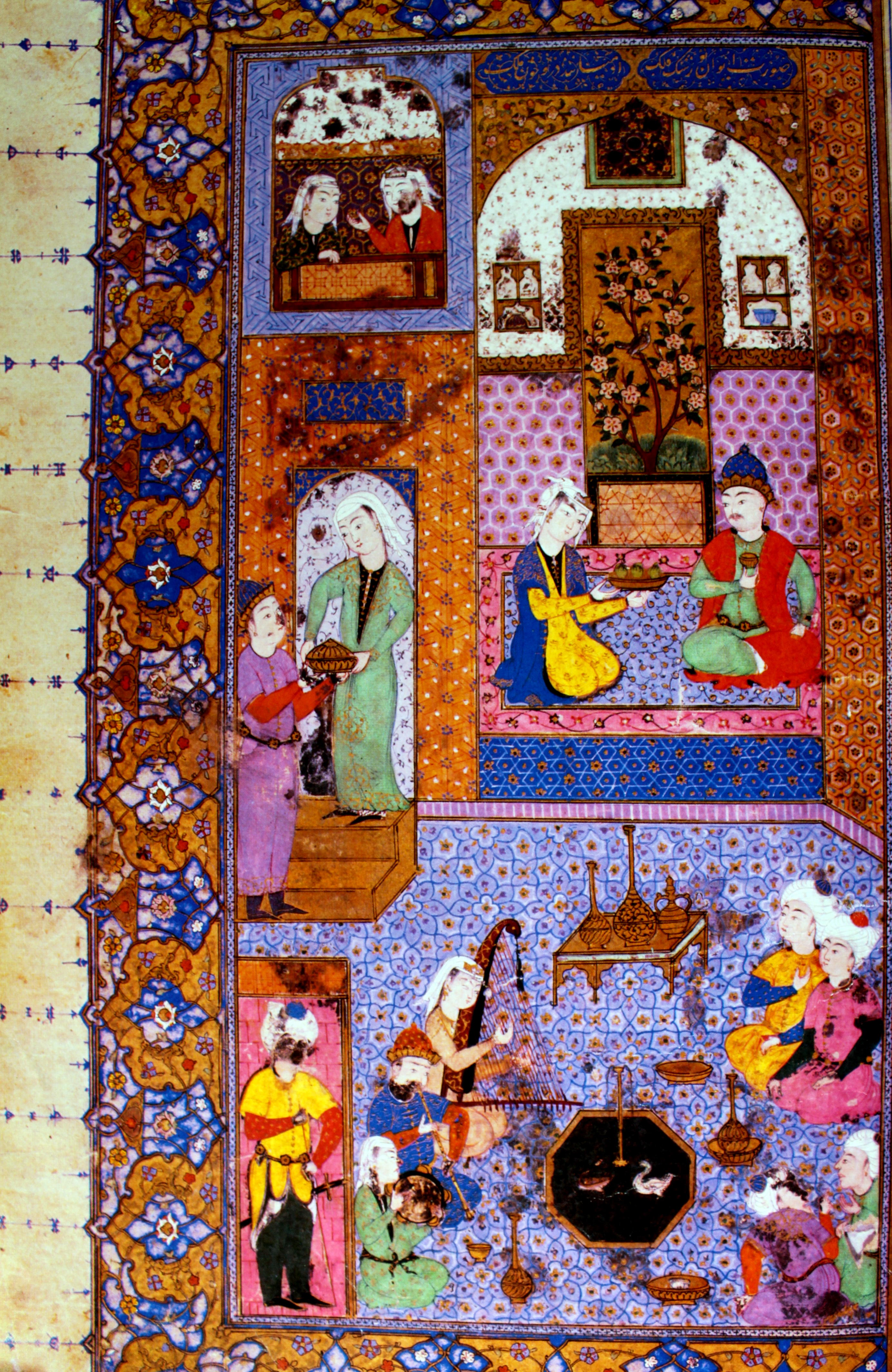 Ziyafət səhnəsi, qoşa miniatür, II hissə, 1491, Herat, Moskva